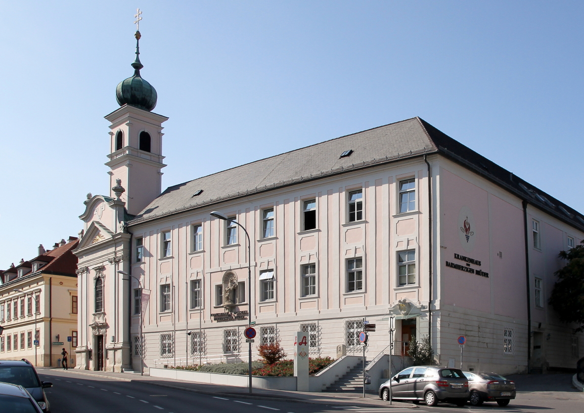 Das Krankenhaus der Barmherzigen Brüder in der burgenländischen Stadt Eisenstadt.